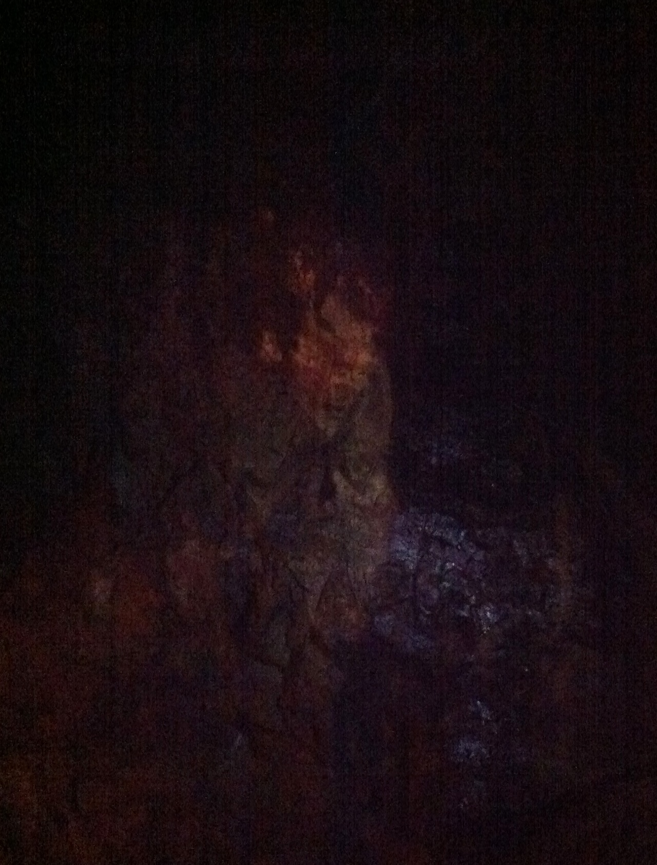 Kleva gruva